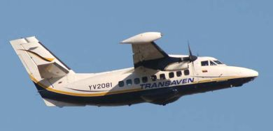 LET- 410 UVP-E